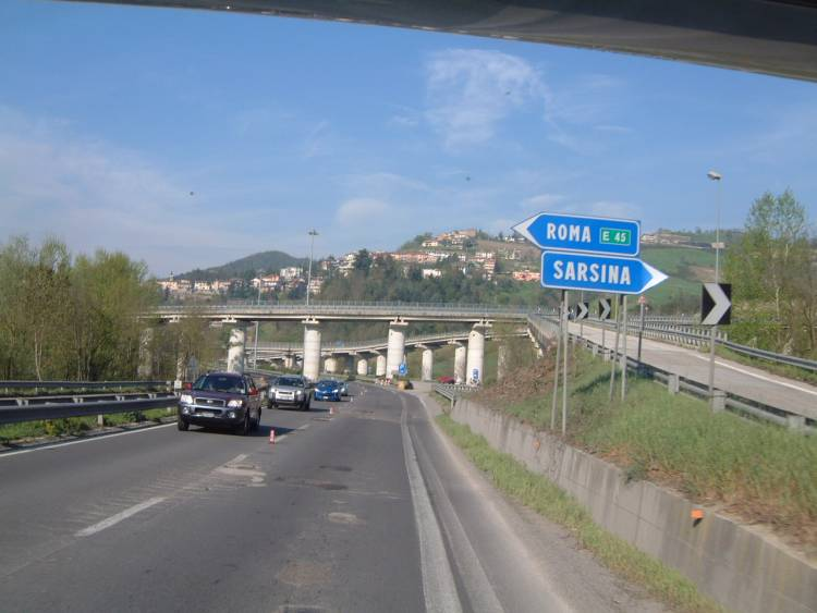 Je suis l'auteur de cette photo prise en avril 2007 sur l'autoroute E45 Ravenne-Rome